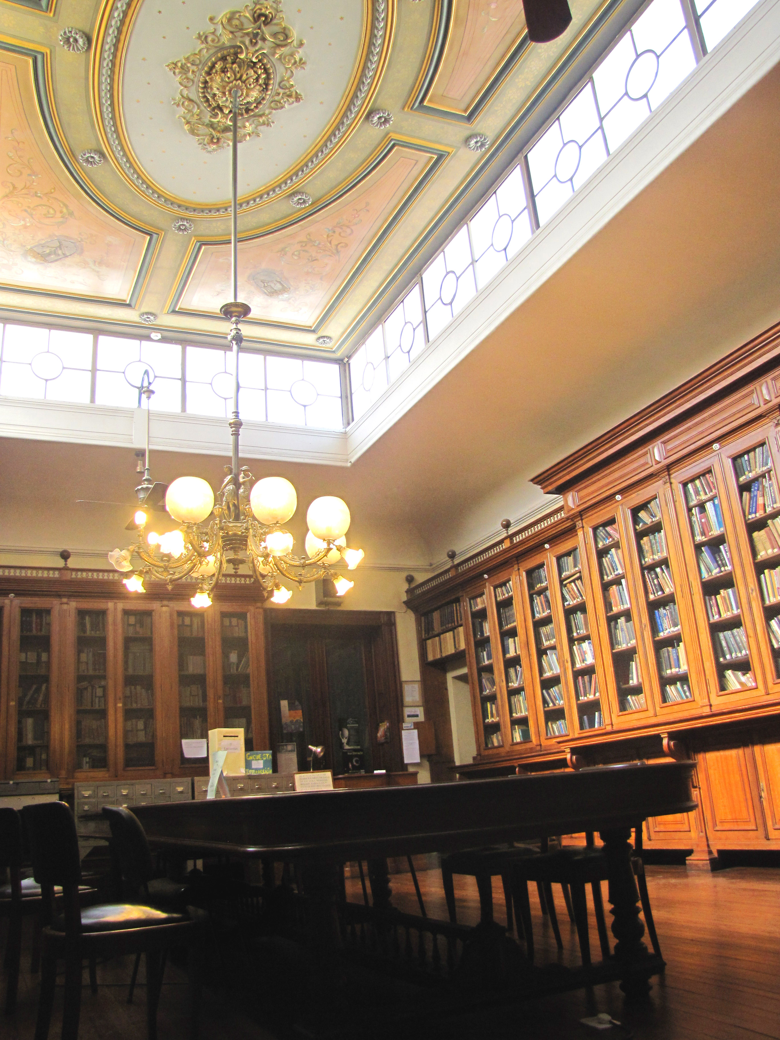 Biblioteca del Observatorio Astronómico de La Plata. Facultad de Ciencias Astronómicas y Geofísicas (UNLP)